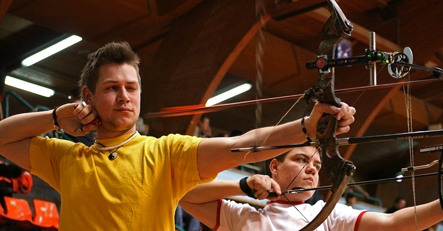 Državno tekmovanje iz lokostrelstva marec 2007, Postojna.